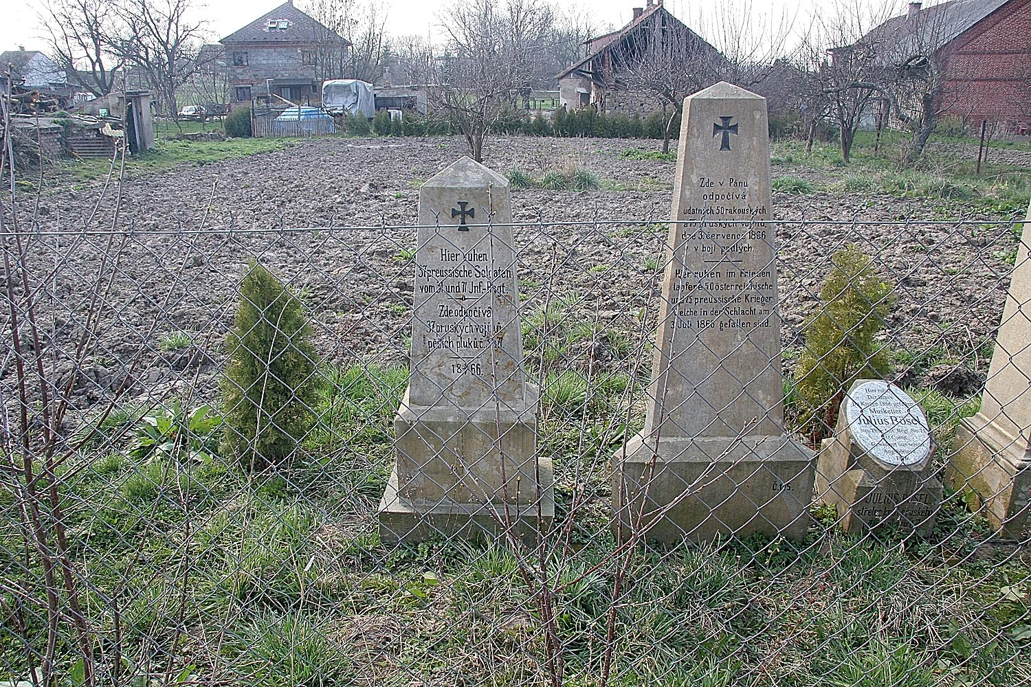 Pomníky padlých z bitvy u Hradce Králové roku 1866 v Horních Dohalicích